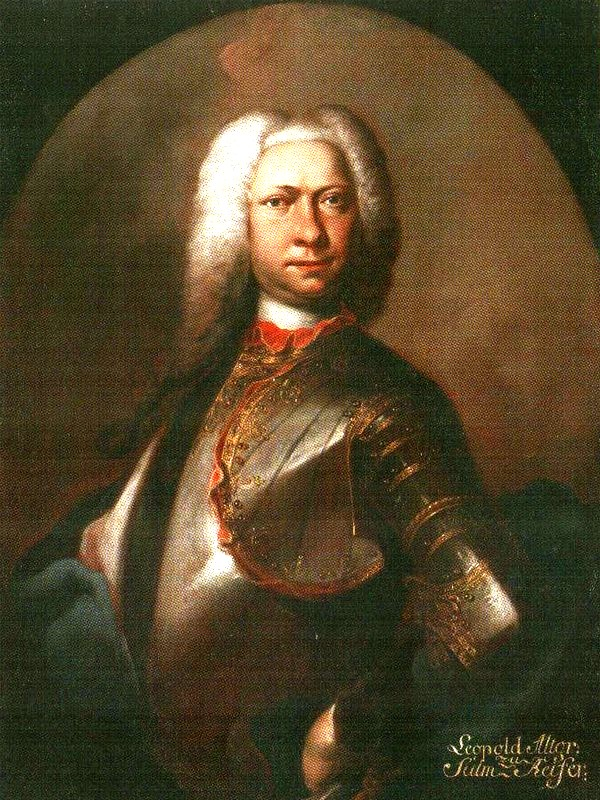 Altgraf Leopold Anton Salm-Reifferscheidt-Hainspach